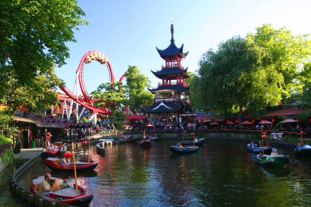 Amusements in Tivoligardens